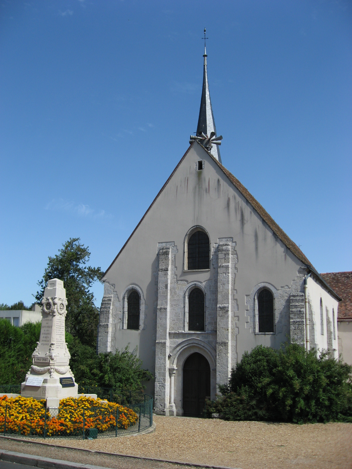 Église de Saint-Prest et monument aux morts de la première guerre mondiale.